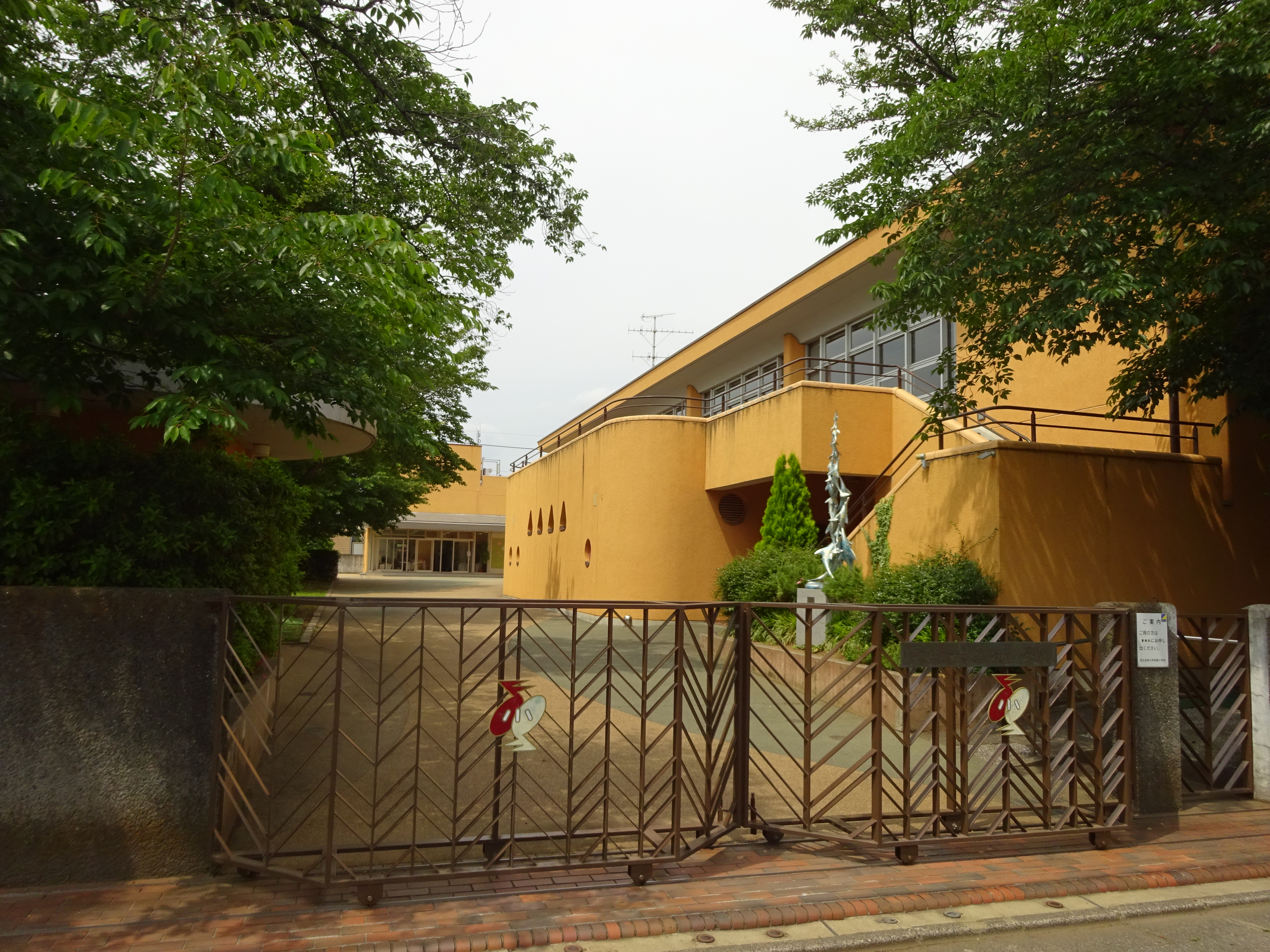 国立音楽大学附属小学校